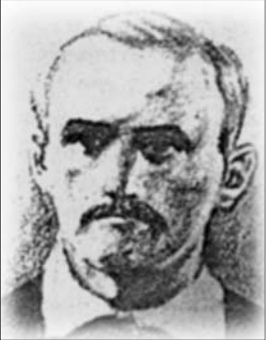 Фотографія Григорія Величка